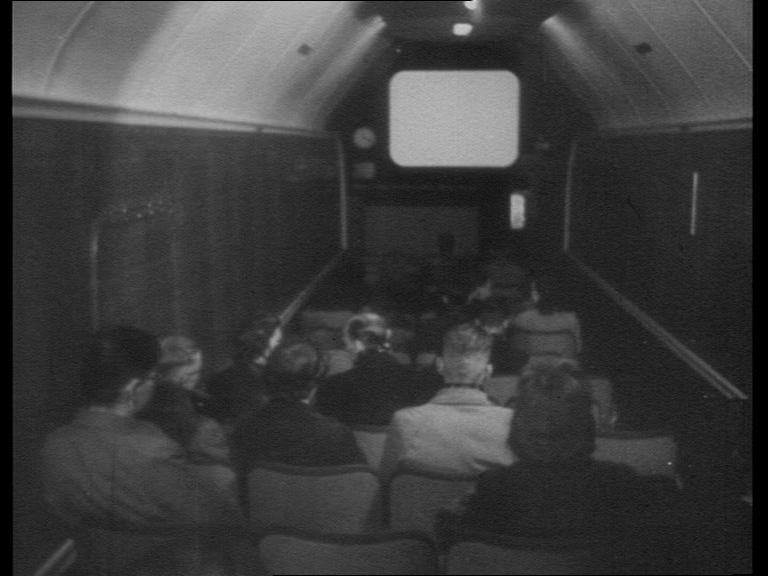 Deel vh interieur van de Spoorbio te Utrecht in 1942. De Spoorbio was een bioscoop in een spoorwegwagon die tussen 1942-1944 en 1945-1964 op station Utrecht Centraal stond. Een tweede Spoorbio zou in diverse plaatsen in Nederland komen te staan.